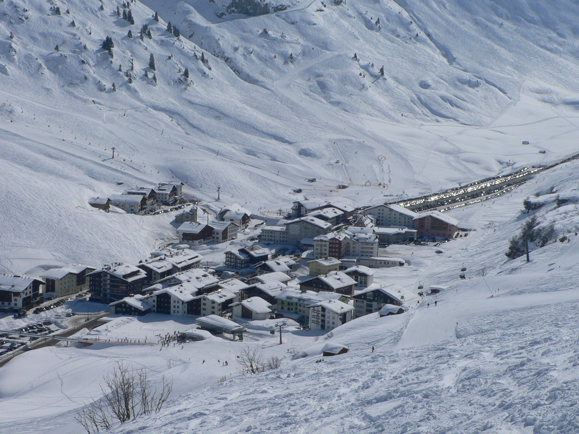 Zürs am Arlberg, sebst fotografiert